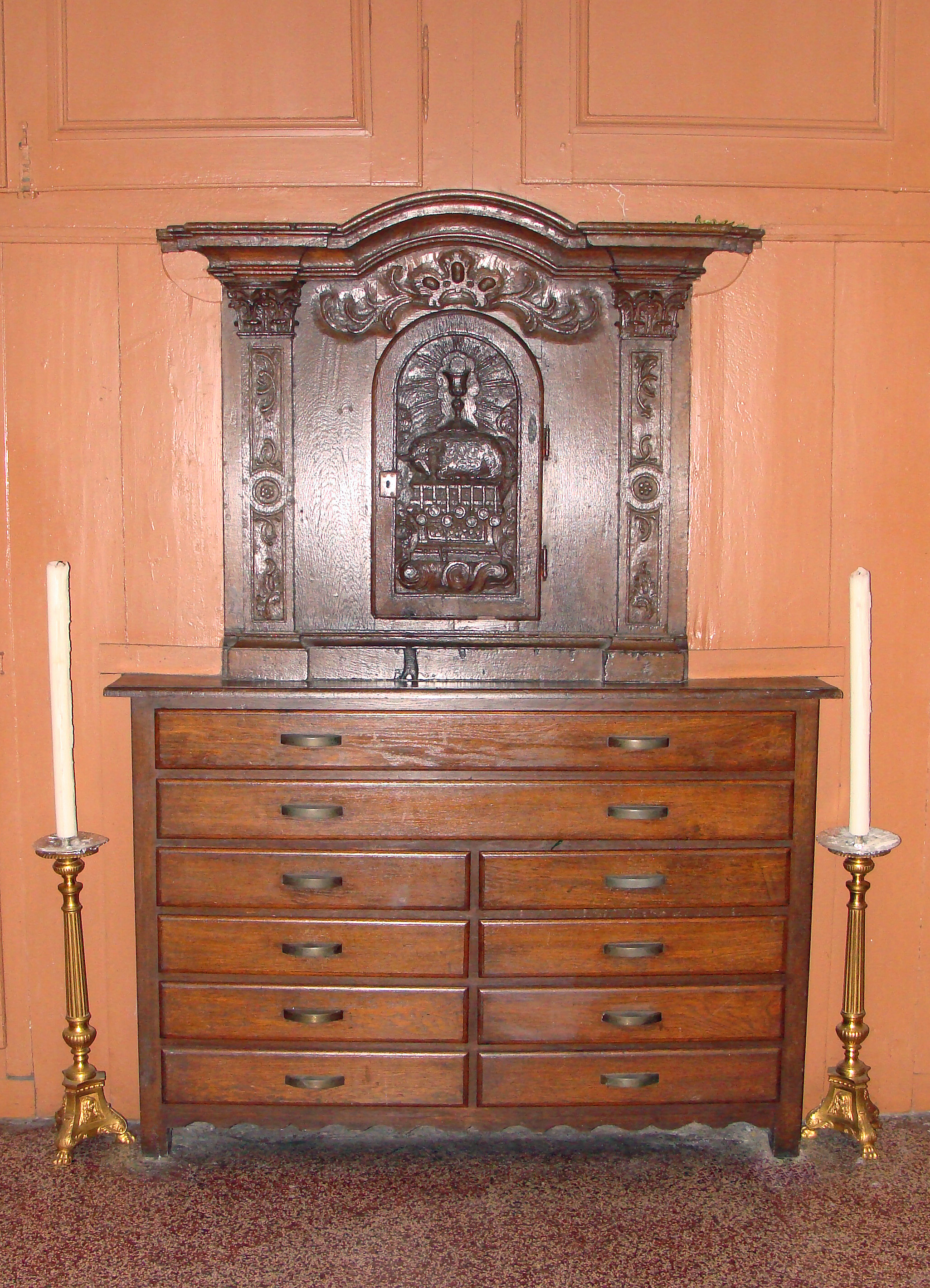 Tabernacle XVIIIe, église Saint-Nicolas, L'Hôpital (Moselle). Le tabernacle se trouve dans la sacristie Nord.